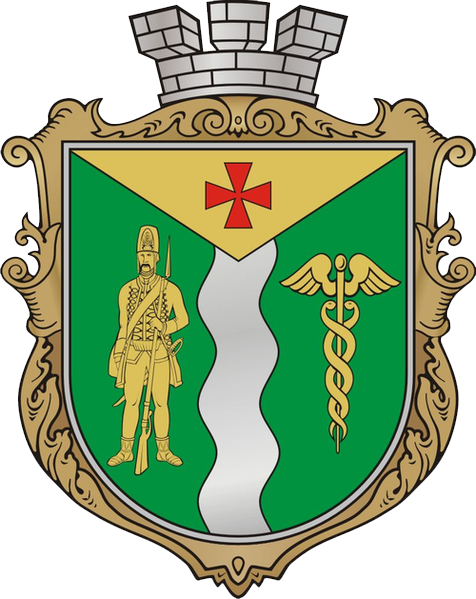 Герб міста Новомиргорода Кіровоградської області